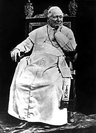 Pius IX